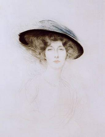 Le chapeau à plume - Mademoiselle Liane de Pougy